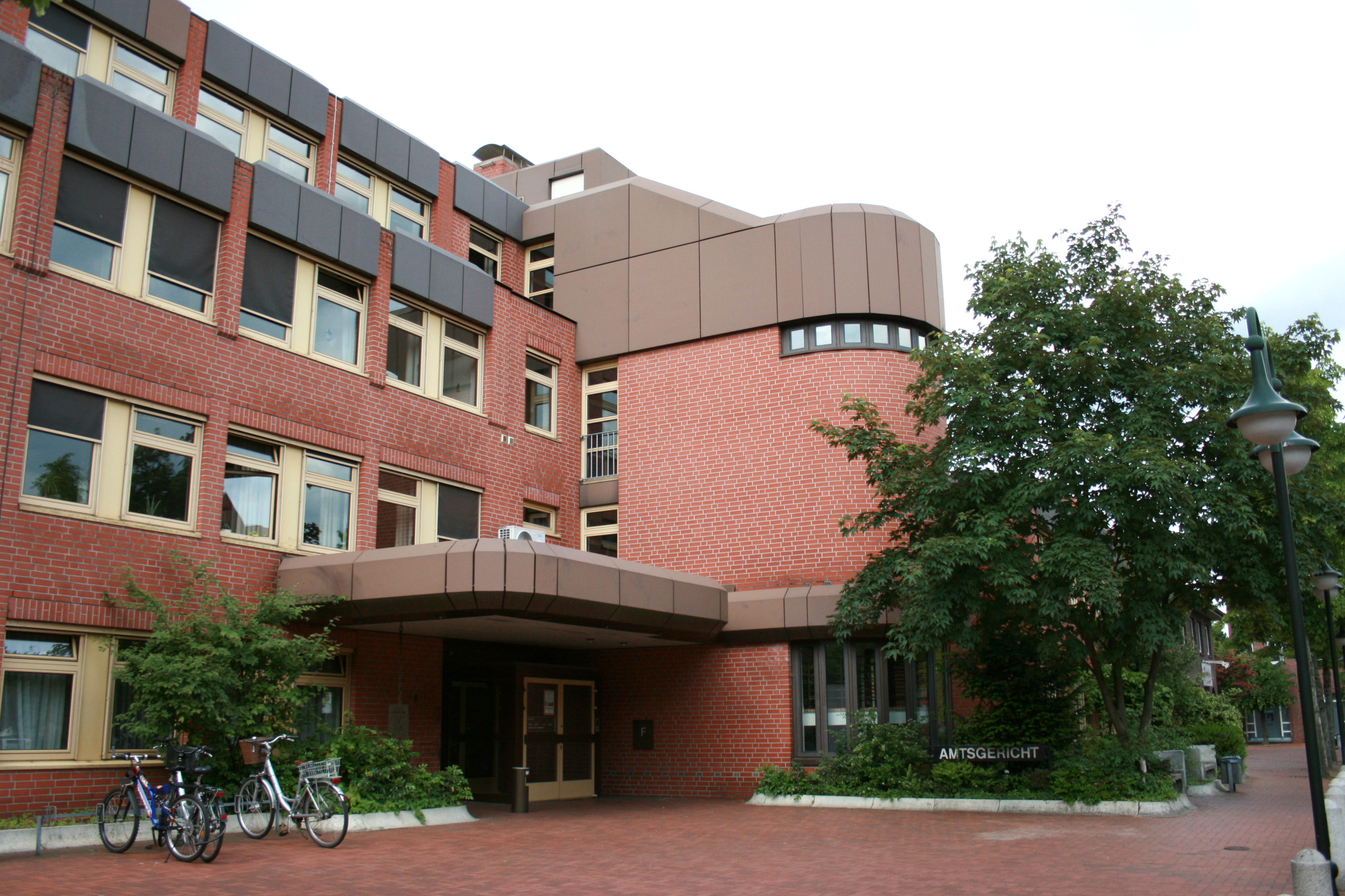 Amtsgericht, Am Pferdemarkt in Rotenburg (Wümme)